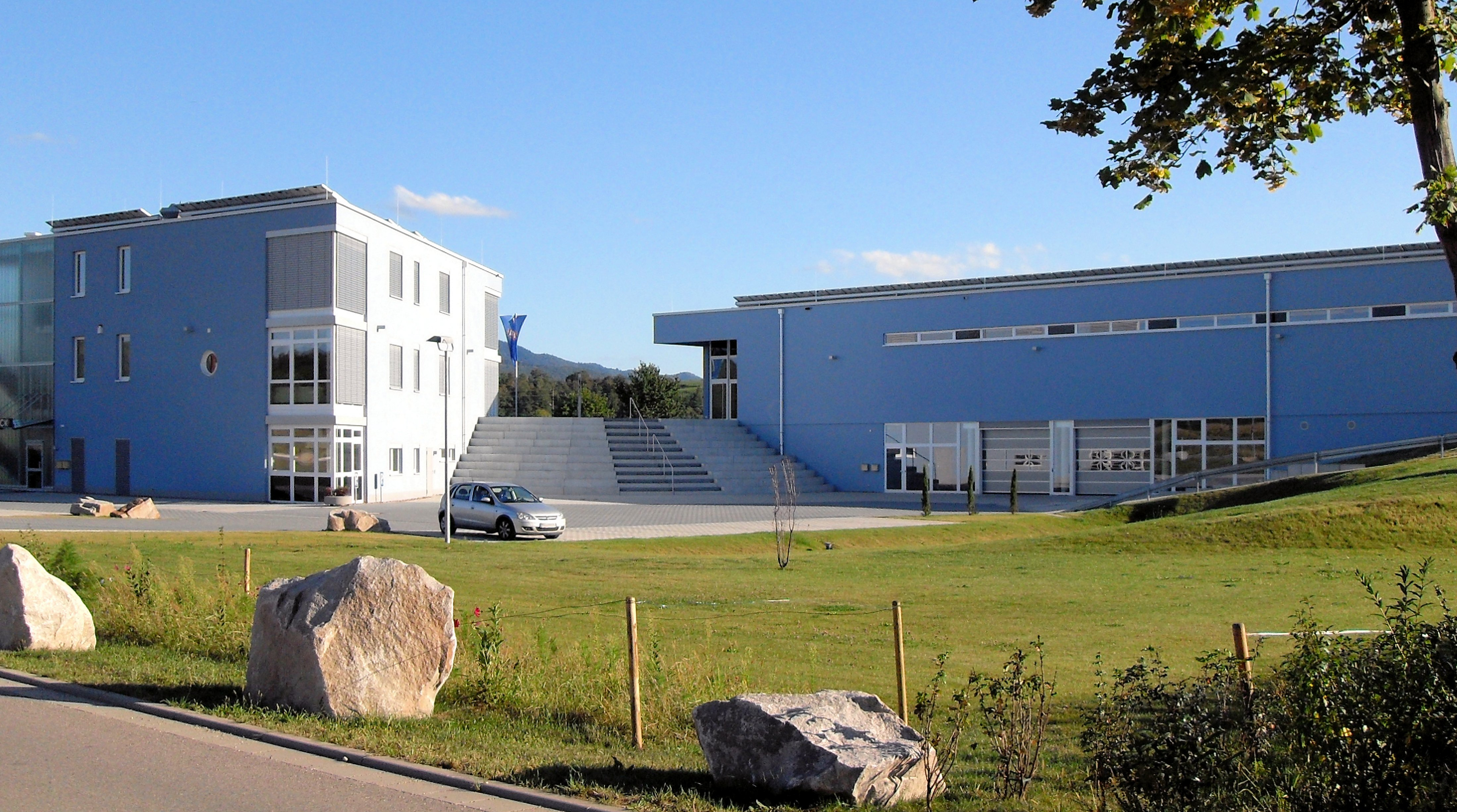 Dreiecklandmuseum Heitersheim, eröffnet 2010